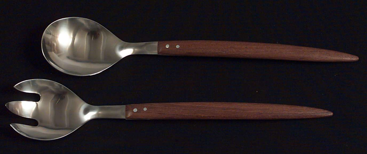 Salatbestikk i teak og rustfritt stål. Foto: Anne-Lise Reinsfelt / Norsk Folkemuseum, NF.2000-1397AB.